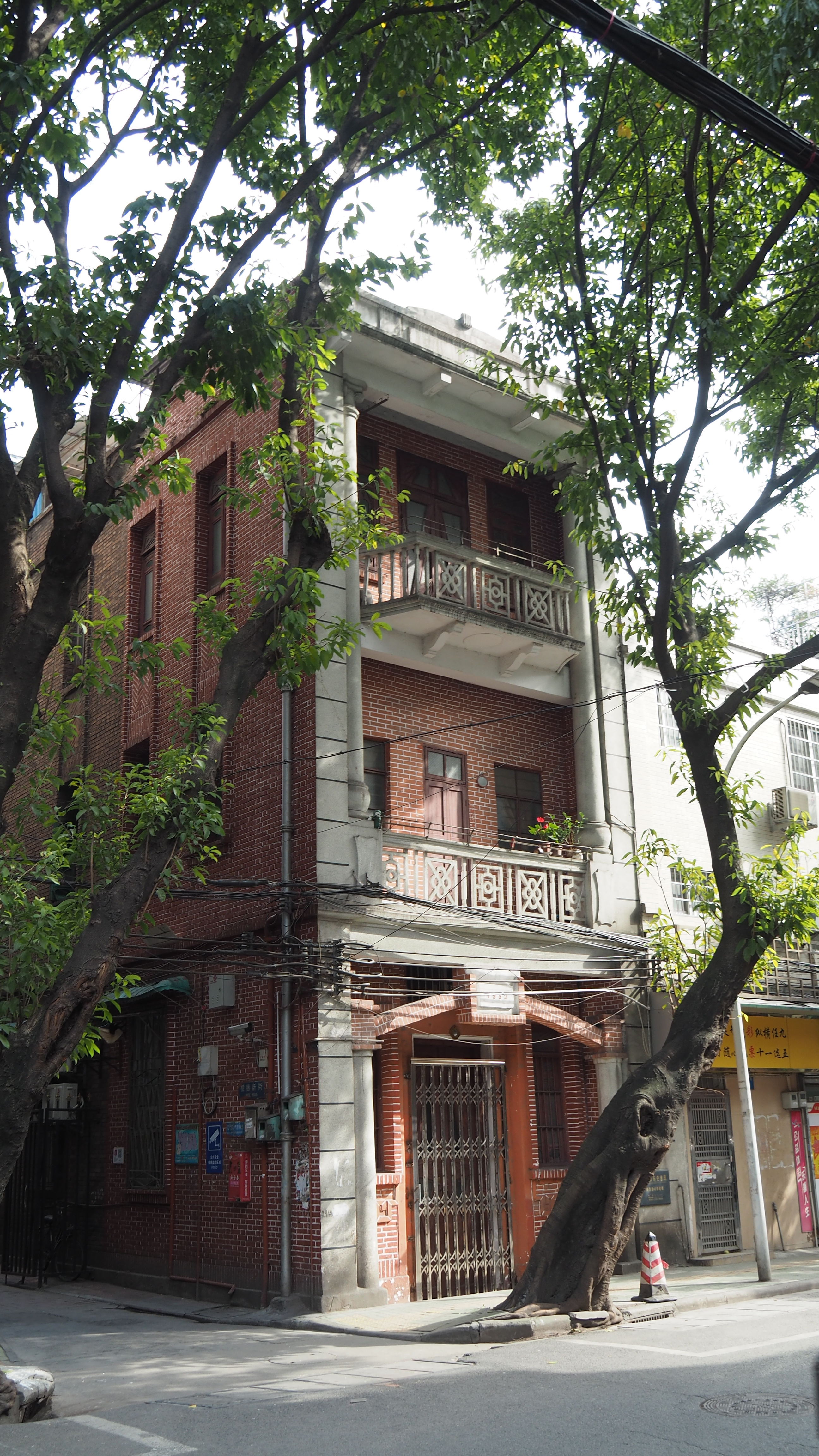 中文（中国大陆）: 位于广东省广州市越秀区纸行路42号。